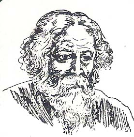 Saints of India, taught the Tamils to find God within their-self, not in temples, through his lyric poems in Tamil. A book by name “theiva Alai”, author Sengai Pothuvan, published in 2007.